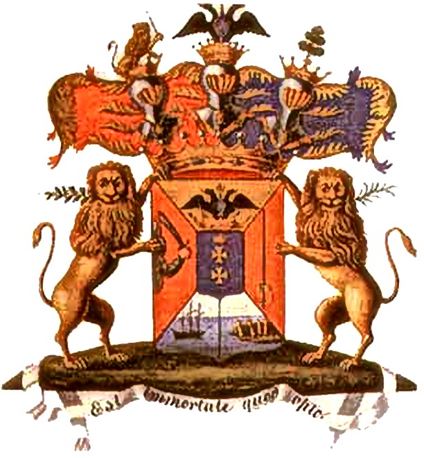 Герб графа Коновницына